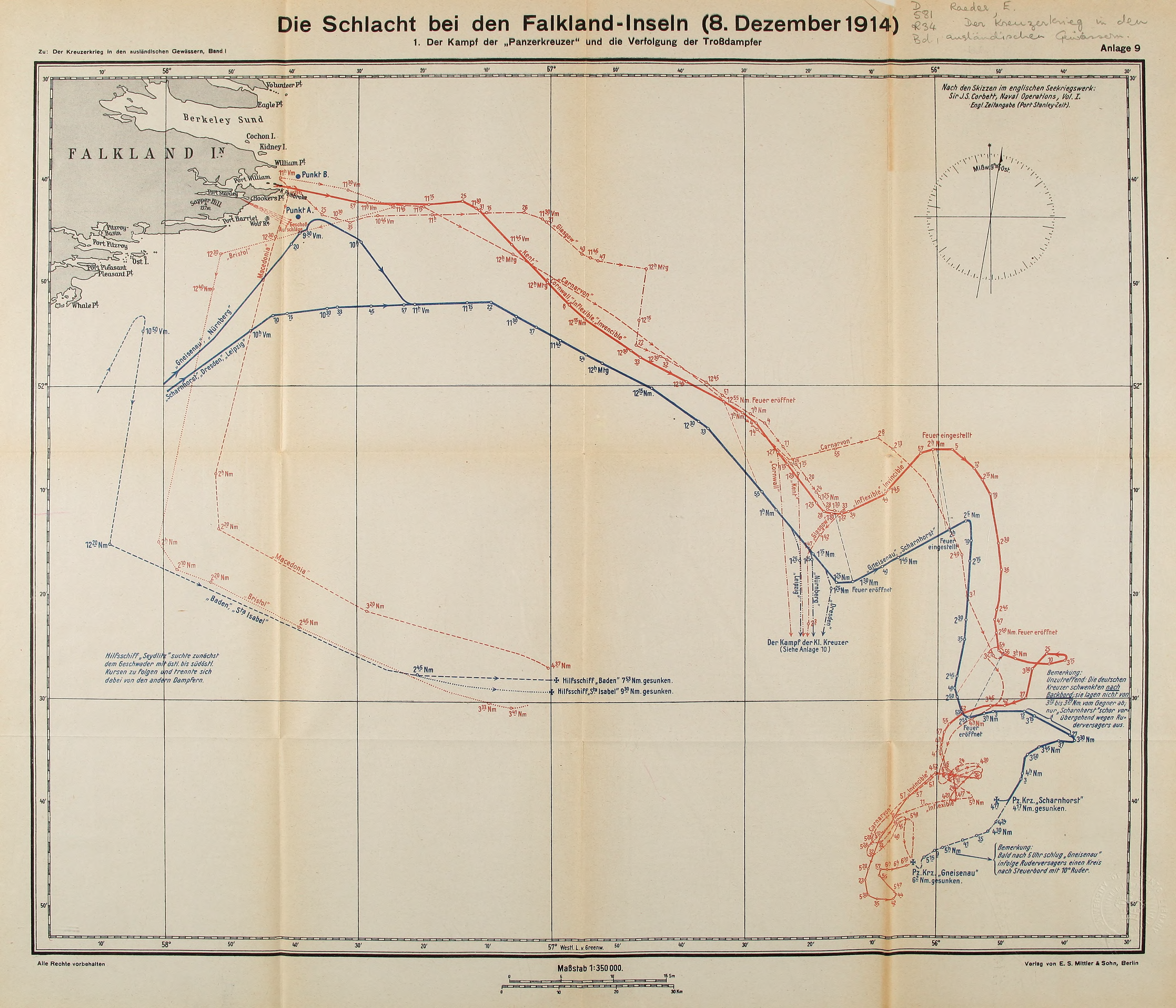 Schlacht bei den Falkland-Inseln (8. Dezember 1914), 1. Der Kampf der Panzerkreuzer und die Verfolgung der Troßdampfer